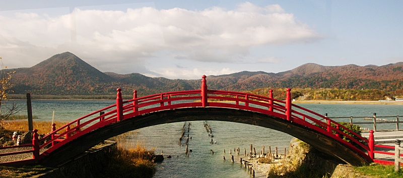 Bridge over Sanzu river at Osorezan